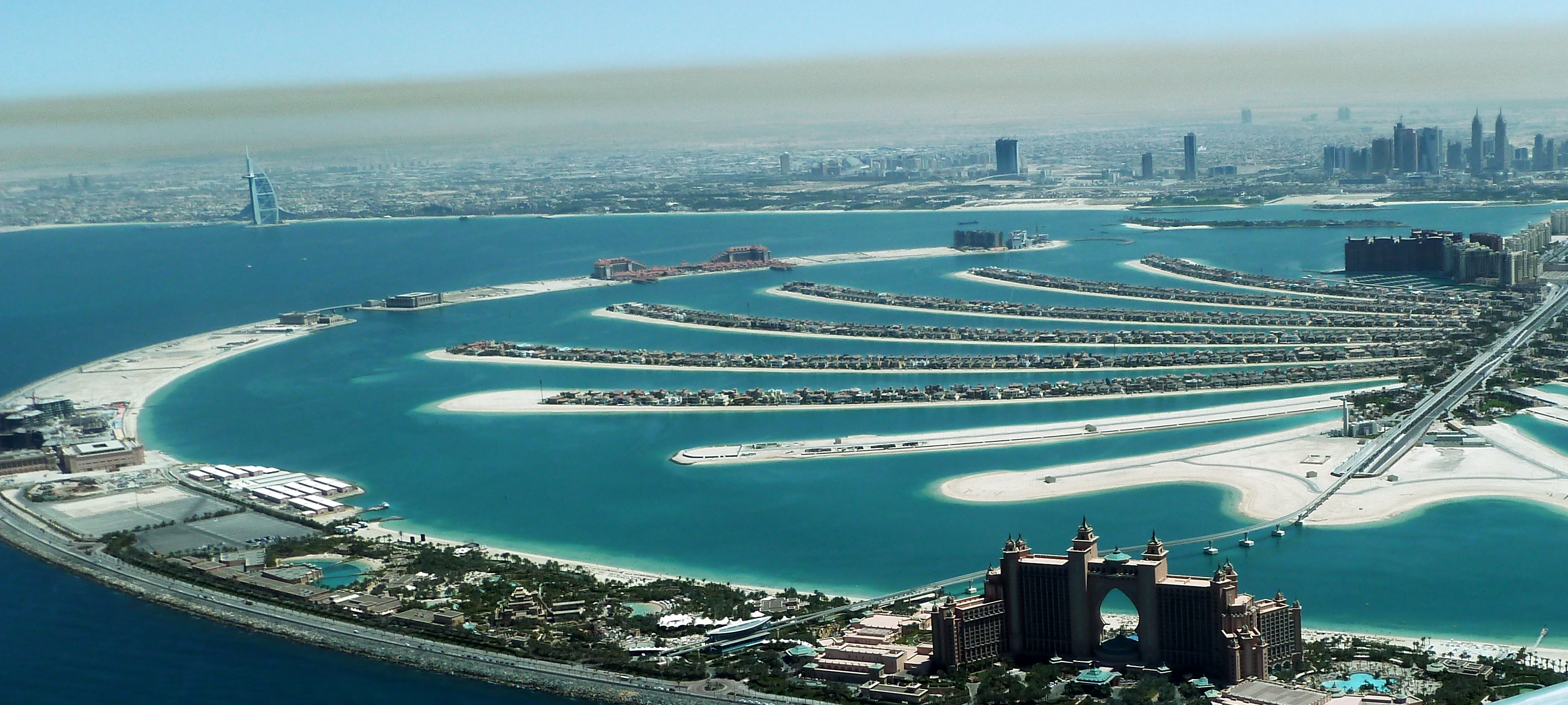 Atlantis auf Palm Jumeirah -- أتلانتيس في نخلة جميرا